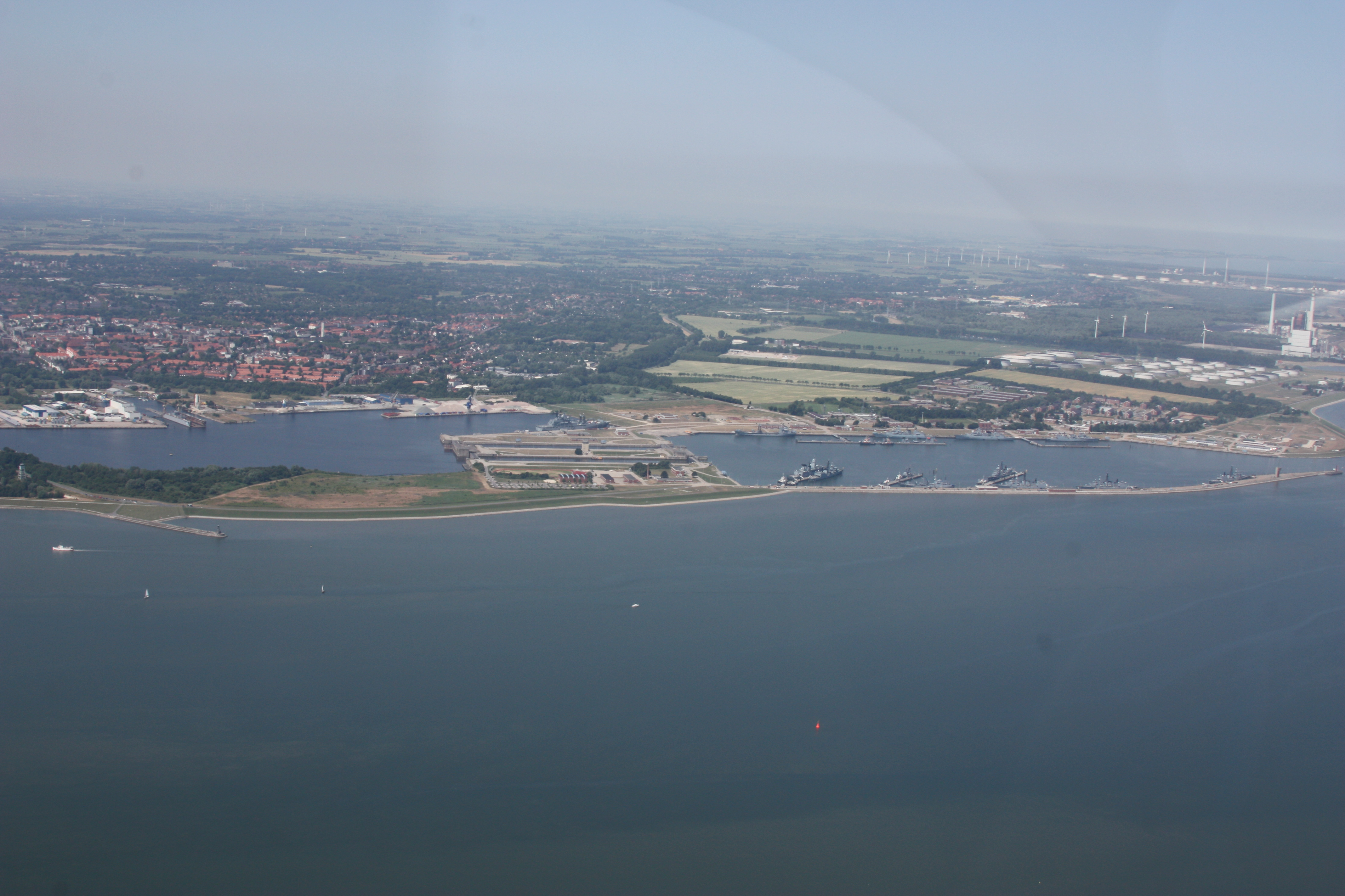 Flug über den Jadebusen und Wilhelmshaven, von Nord nach Süd; weiter nachOldenburg; Flughöhe 500 m = 1500 ft; Juli 2010